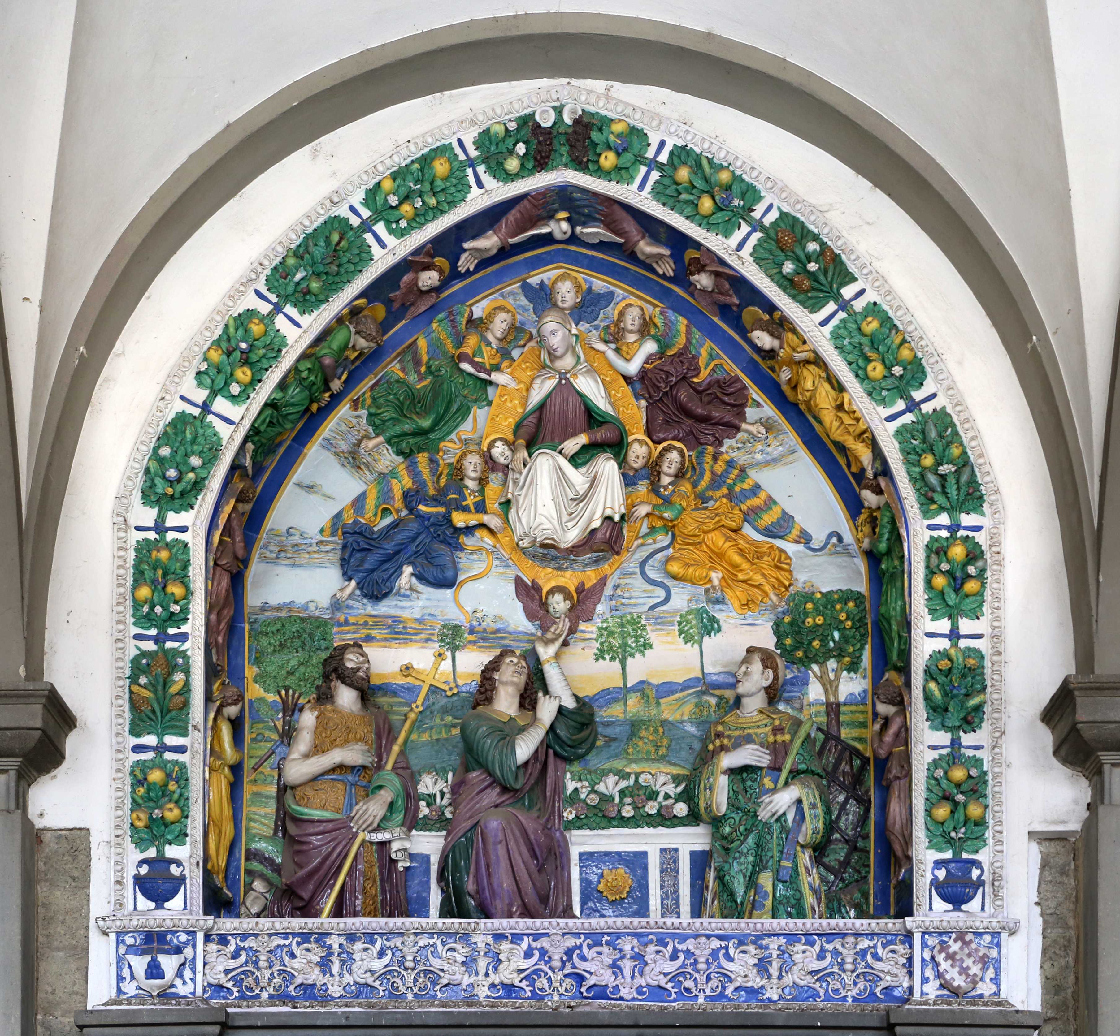 Centro Storico di San Giovanni Valdarno This is a photo of a monument which is part of cultural heritage of Italy.